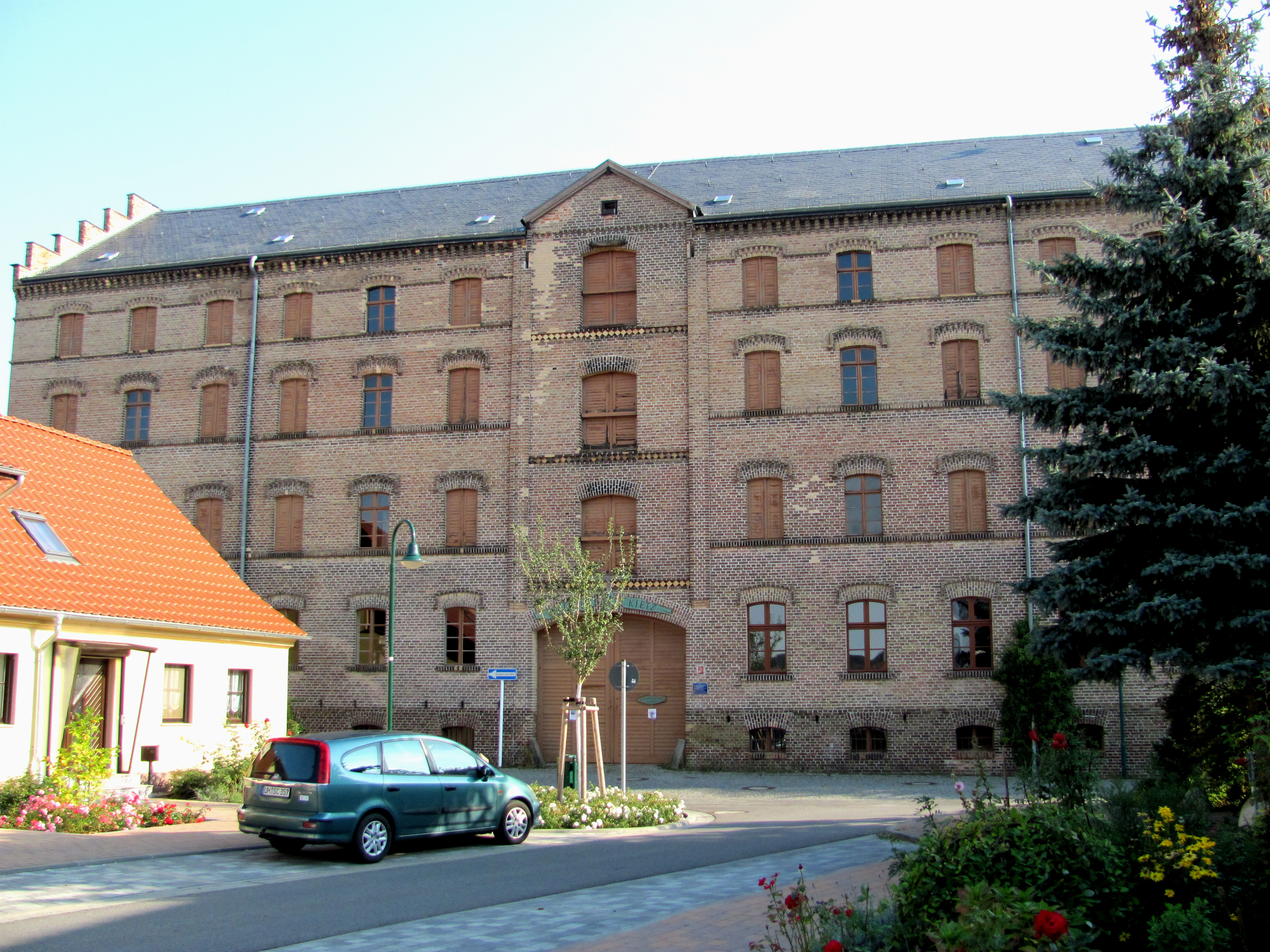 Tabakspeicher in Schwedt, Gerberstraße, Haupteingang